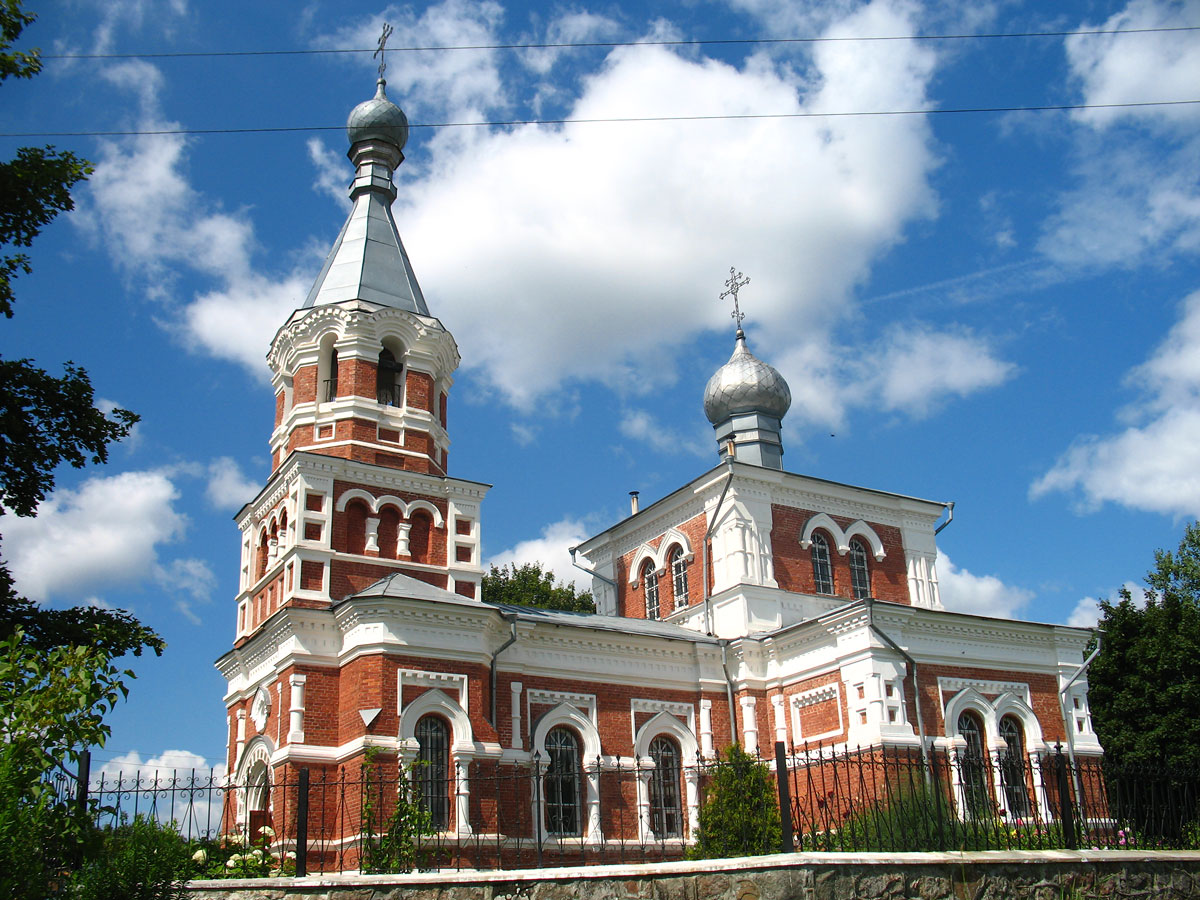 Беларуская (тарашкевіца): Лужасна